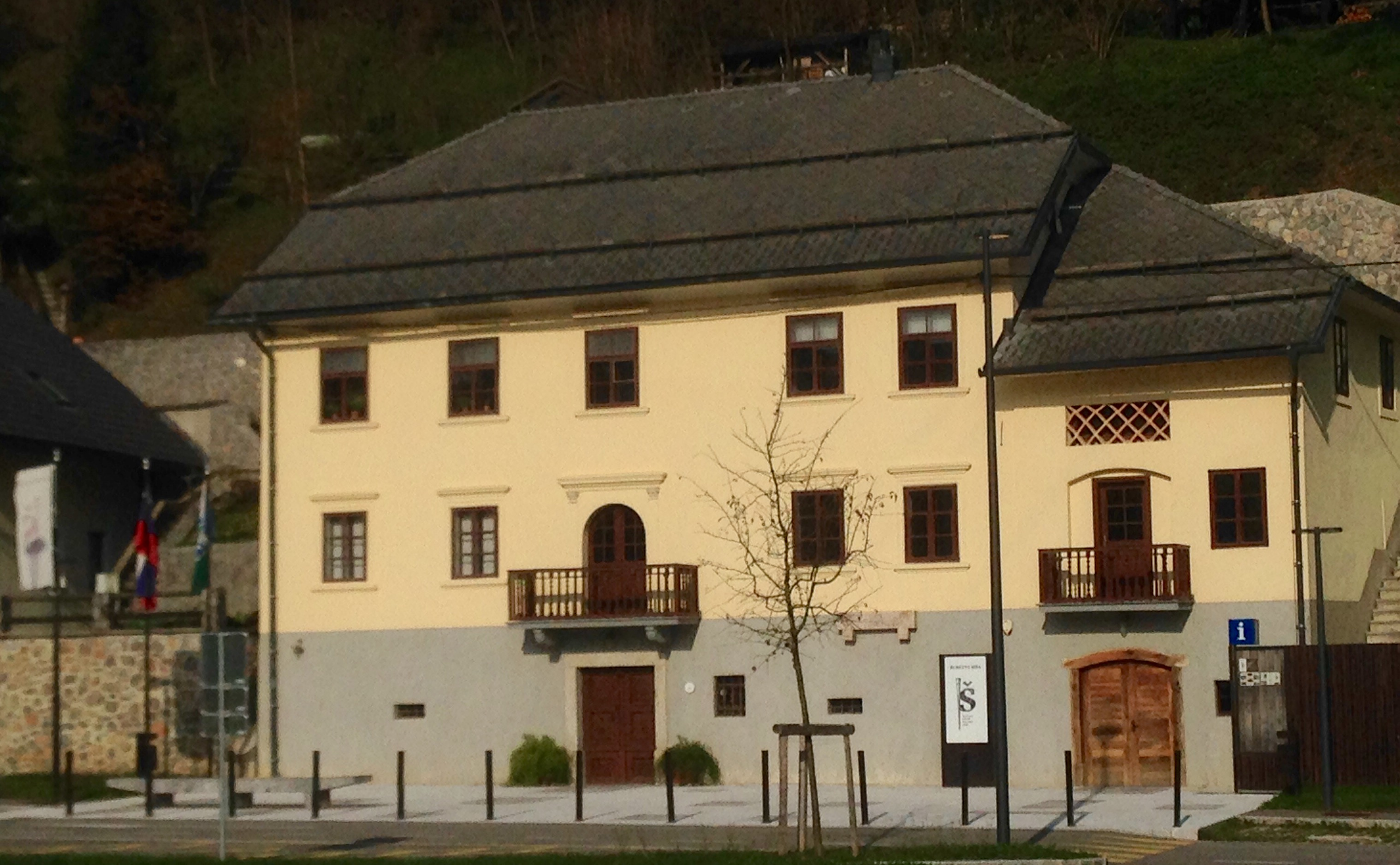 Kulturni center slikarjev Šubic, Poljane